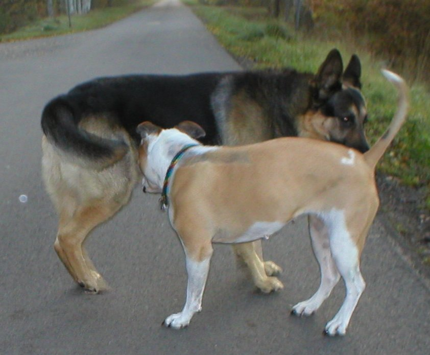 Ano-Genital-Kontrolle bei zwei Hunden. Teil des Sozialverhaltens: Hündin beschnüffelt die Genitalien des Rüden, Rüde beschnüffelt Hinterteil der Hündin. Beide Hunde einander unbekannt und auf neutralem Gebiet im Freilauf. Die Hündin wurde in der Vergangenheit drei Mal von einem Schäferhund angegriffen und gebissen, dies könnte das angespannte Verhalten (steil erhobene Rute) mit erklären. Source: Selbst erstelltes Foto mit eigener Hündin.